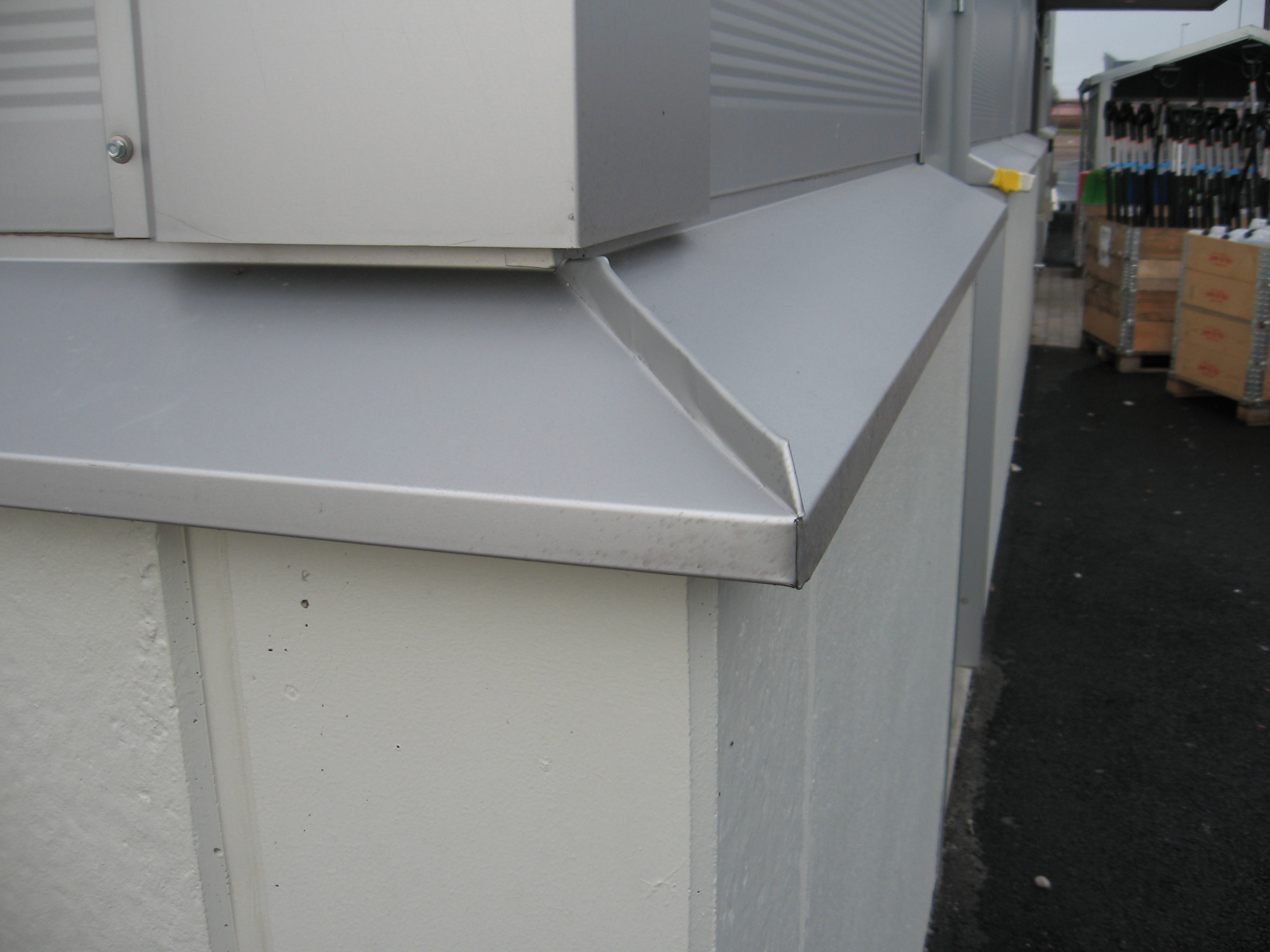 Hörn på hus med fasad av betongsandwichsockel och plåtsandwichelementväggar.